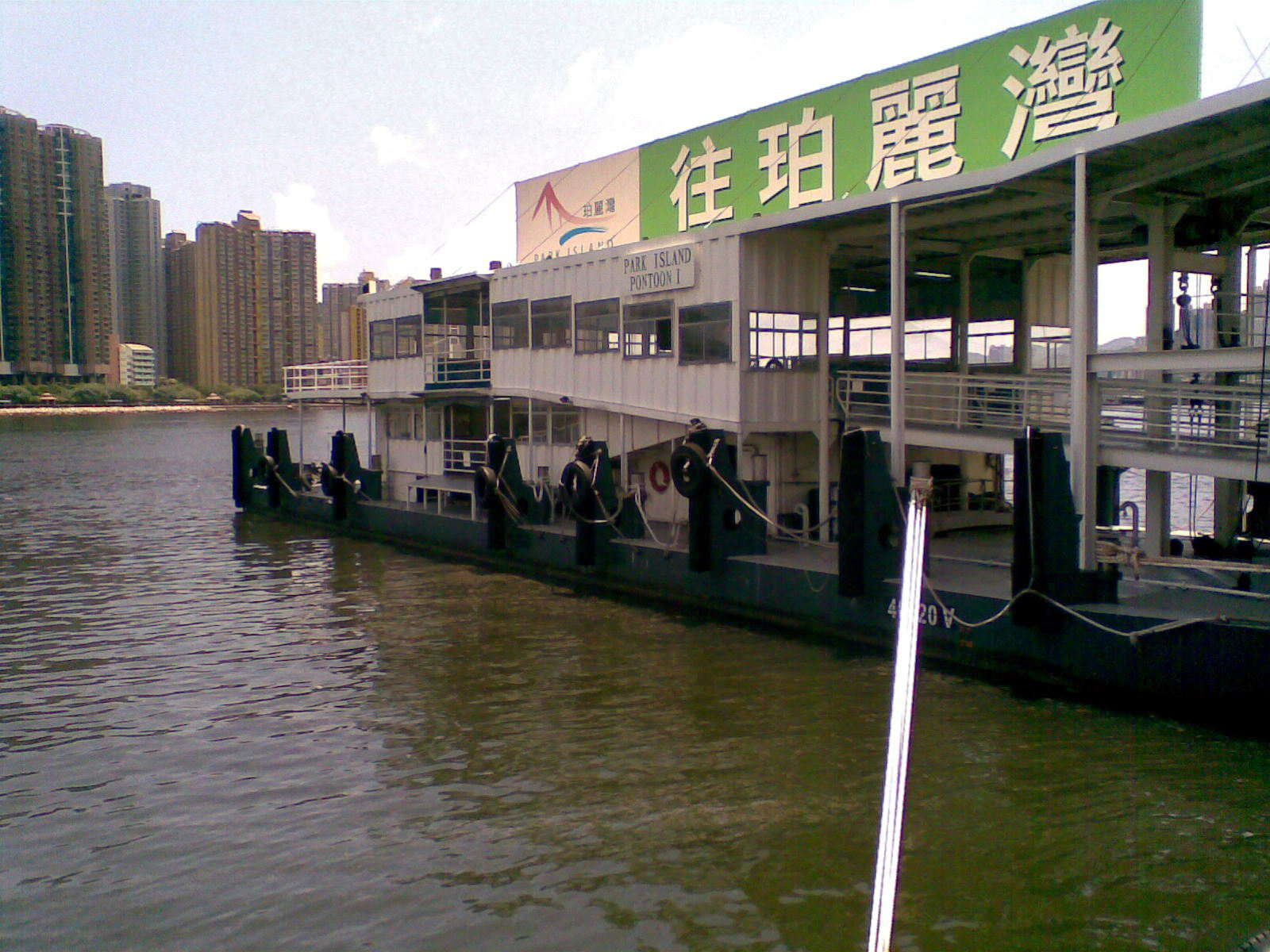 荃灣碼頭